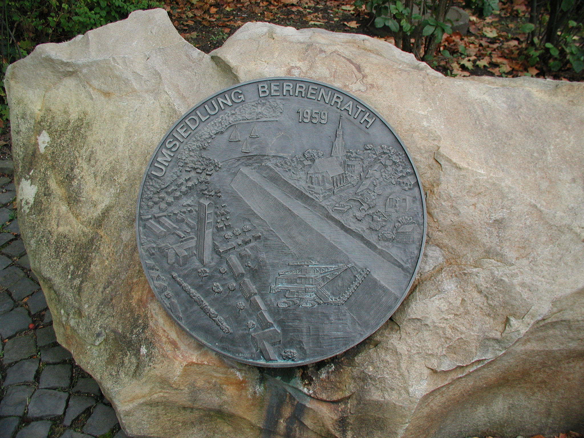 Hürth-Berrenrath, Gedenkstein Umsiedlung 1959